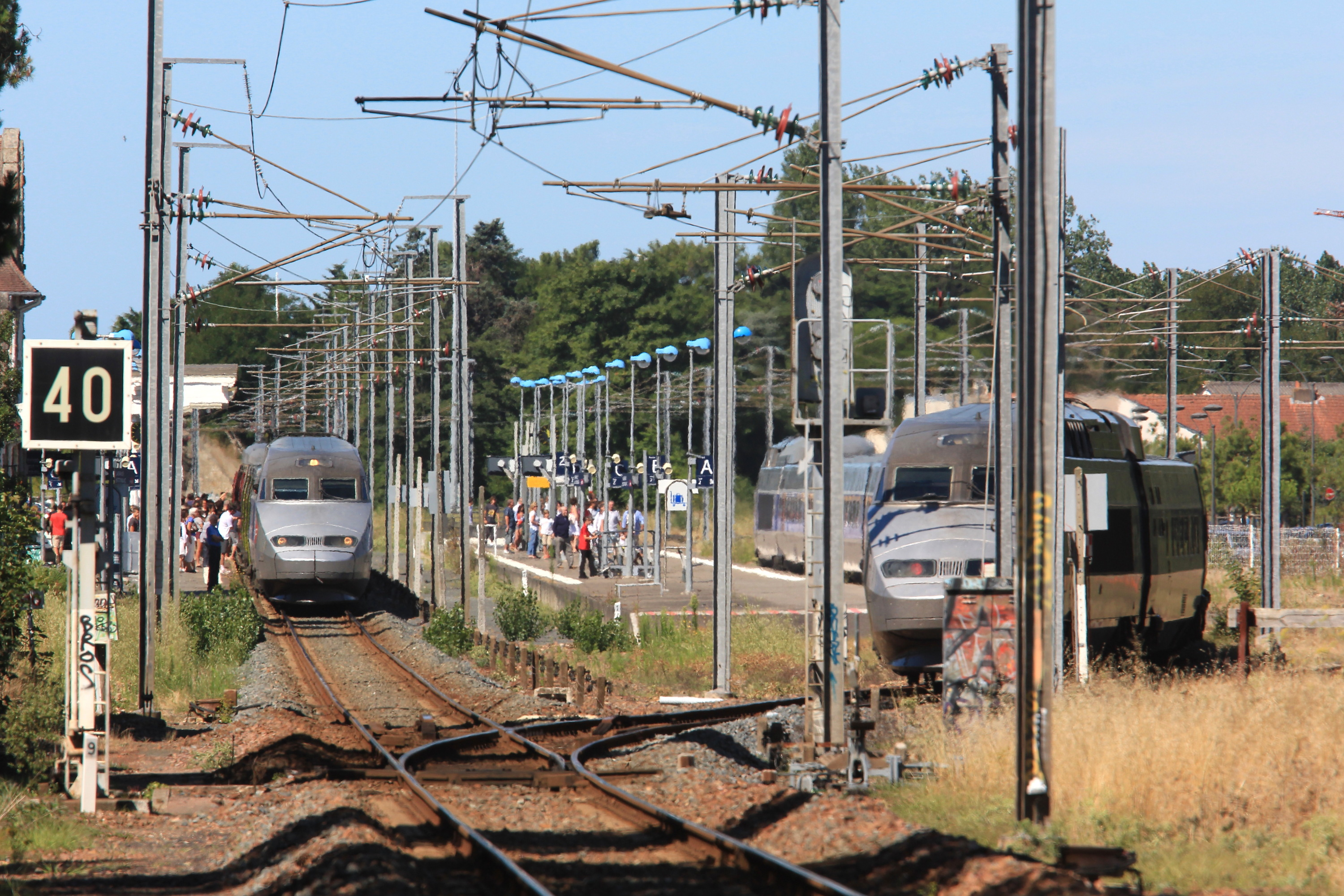 les rames de TGV Atlantique n°339 (à droite) et n°341 (à gauche) assurant respectivement les TGV n°8911 et TGV n° 8932 Paris Le Croisic se croisent en gare de La Baule-Escoublac à midi.